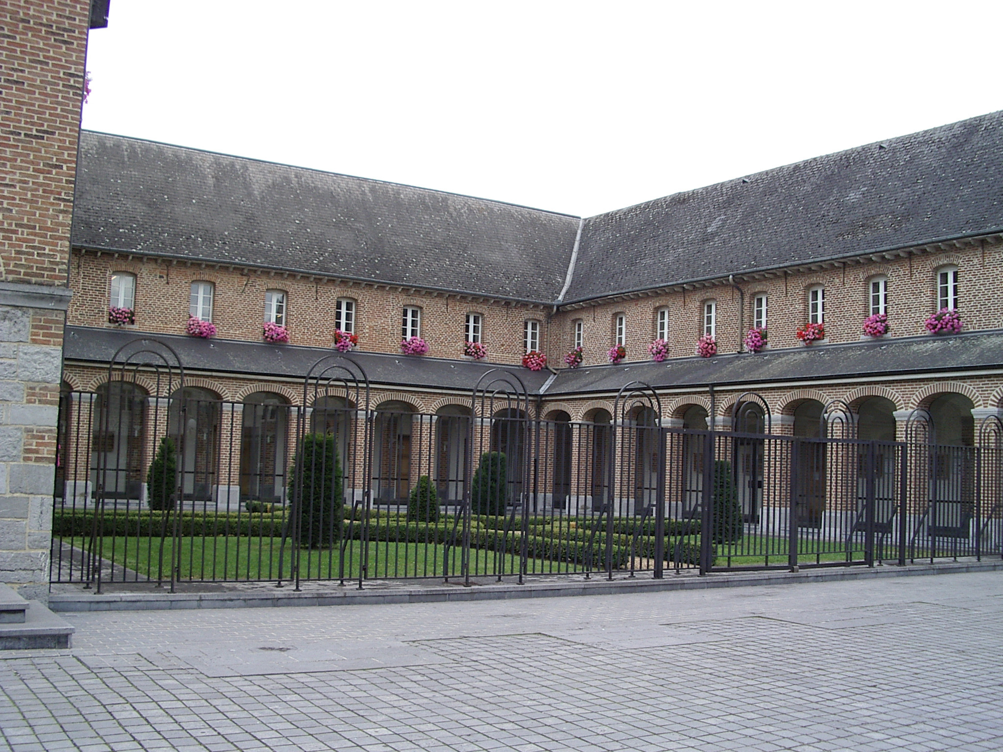 Le couvent des Récollectines est un couvent de religieuses de l'ordre des Récollets situé à Givet dans les Ardennes.